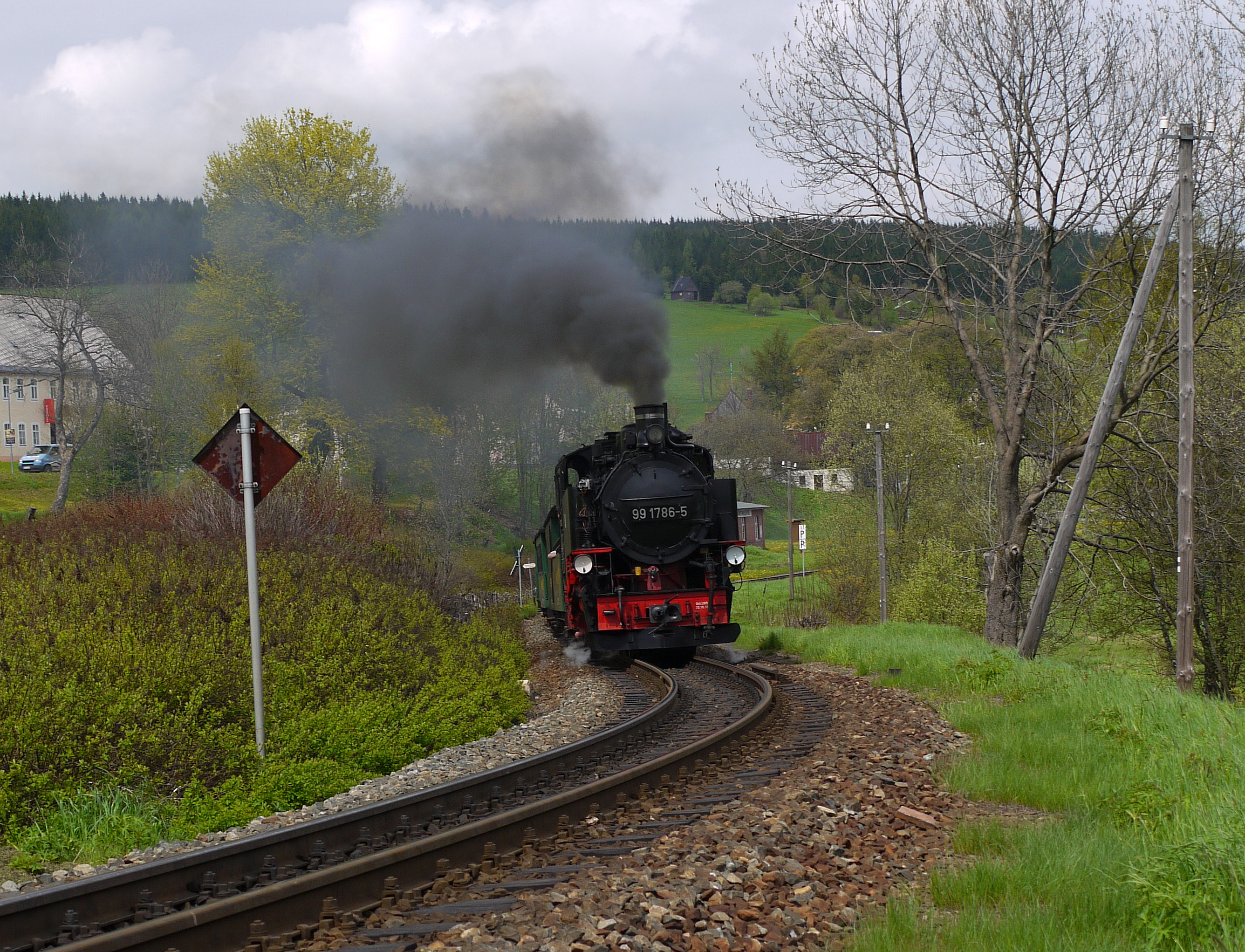 Dampflokomotive der Baureihe 99.77 der Deutschen Reichsbahn auf der Fichtelbergbahn.